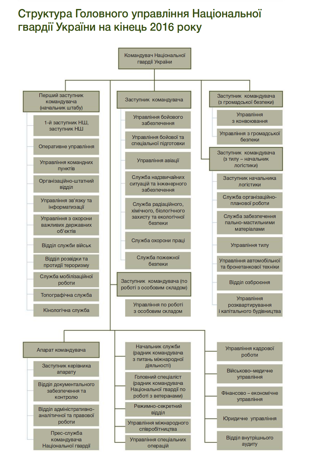 Національна гвардія України, Структура головного управління